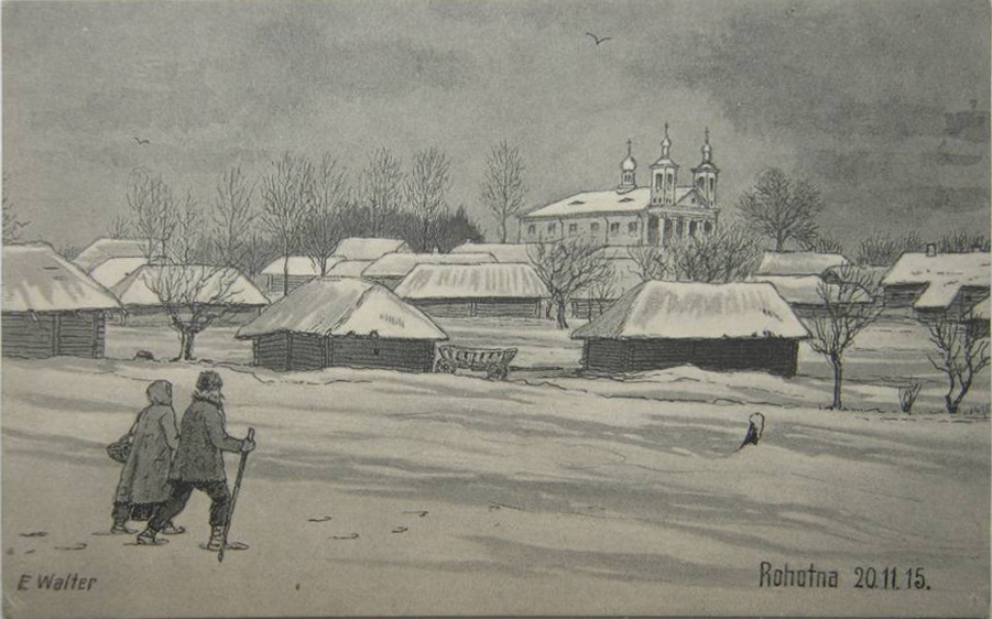 Беларуская (тарашкевіца): Раготна (Rahotna). Касьцёл